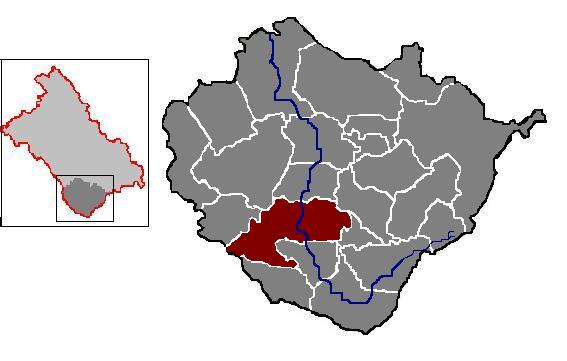 Miasto Międzylesie na mapie gminy Międzylesie